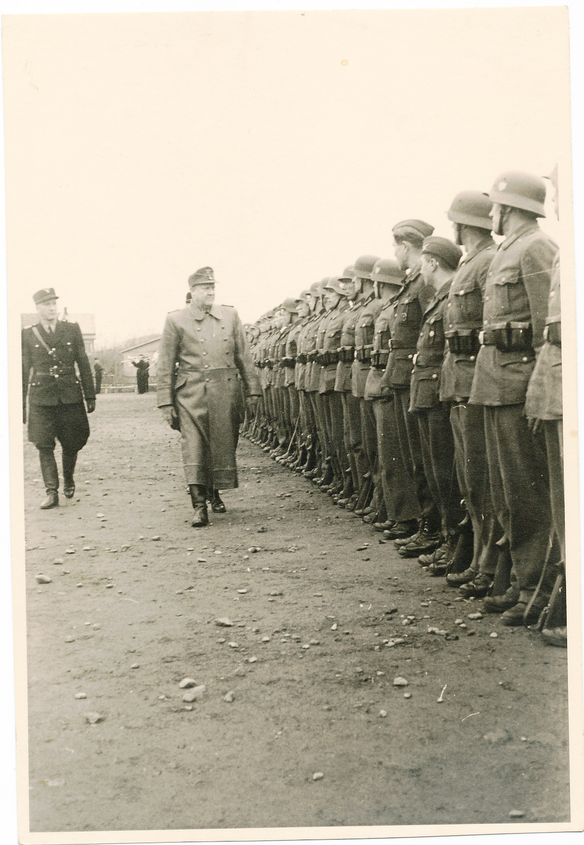 Ukjent datering. RA/PA-0748/Fc/0001 (1130)